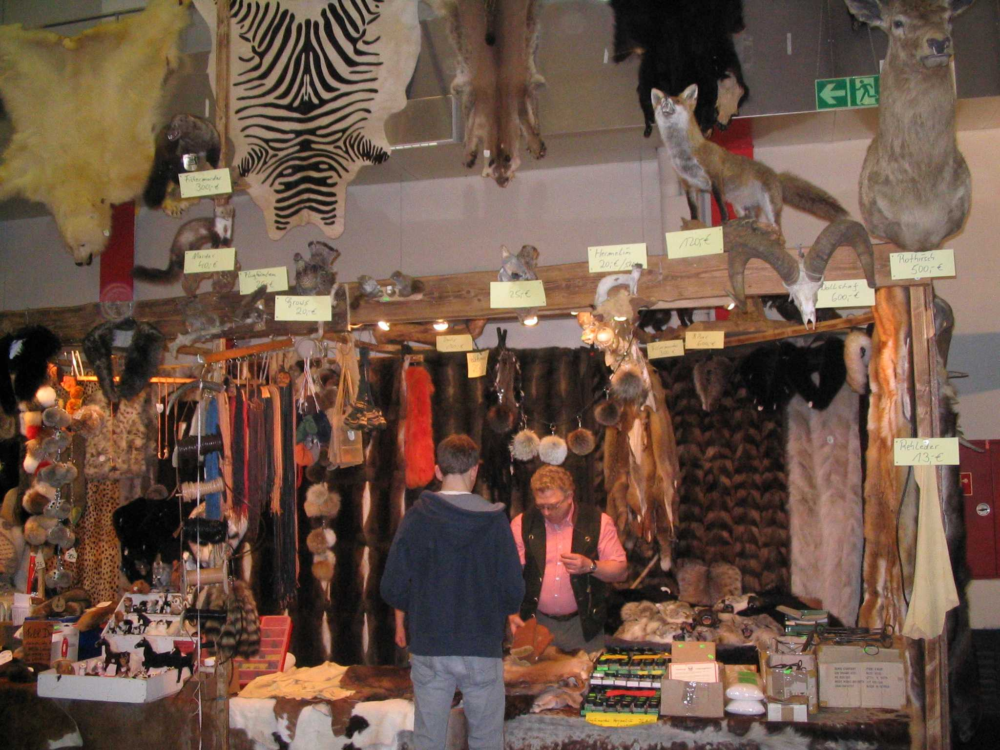 Messe „Jagd und Hund“, Dortmund Westfalenhallen, 29. Januar bis 3. Februar 2013. Stand der Firma Fell-Dieck aus Lienen.